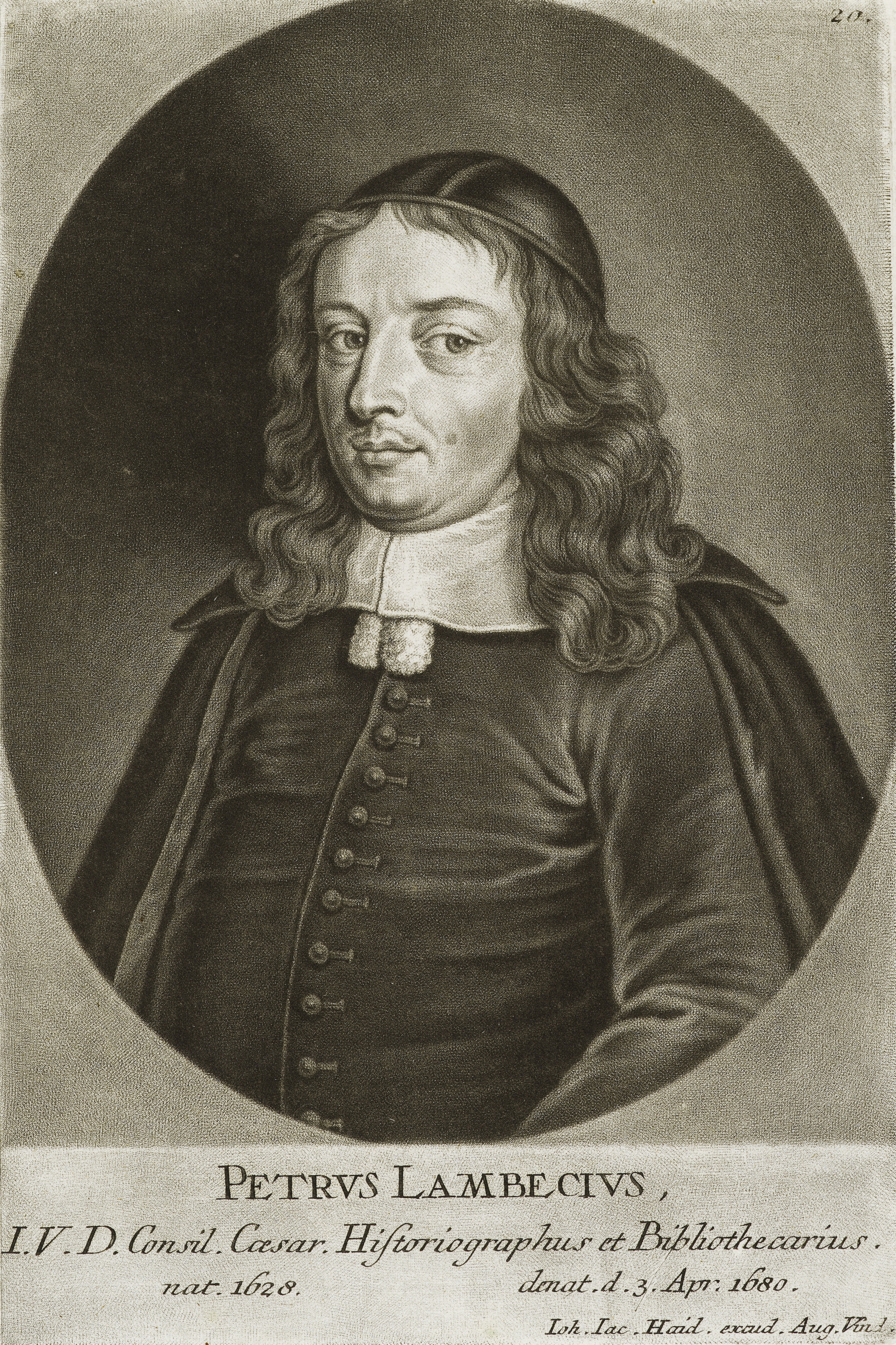 Petrus Lambecius, I. V. D. Consil. Caesar. Historiographus et Bibliothecarius